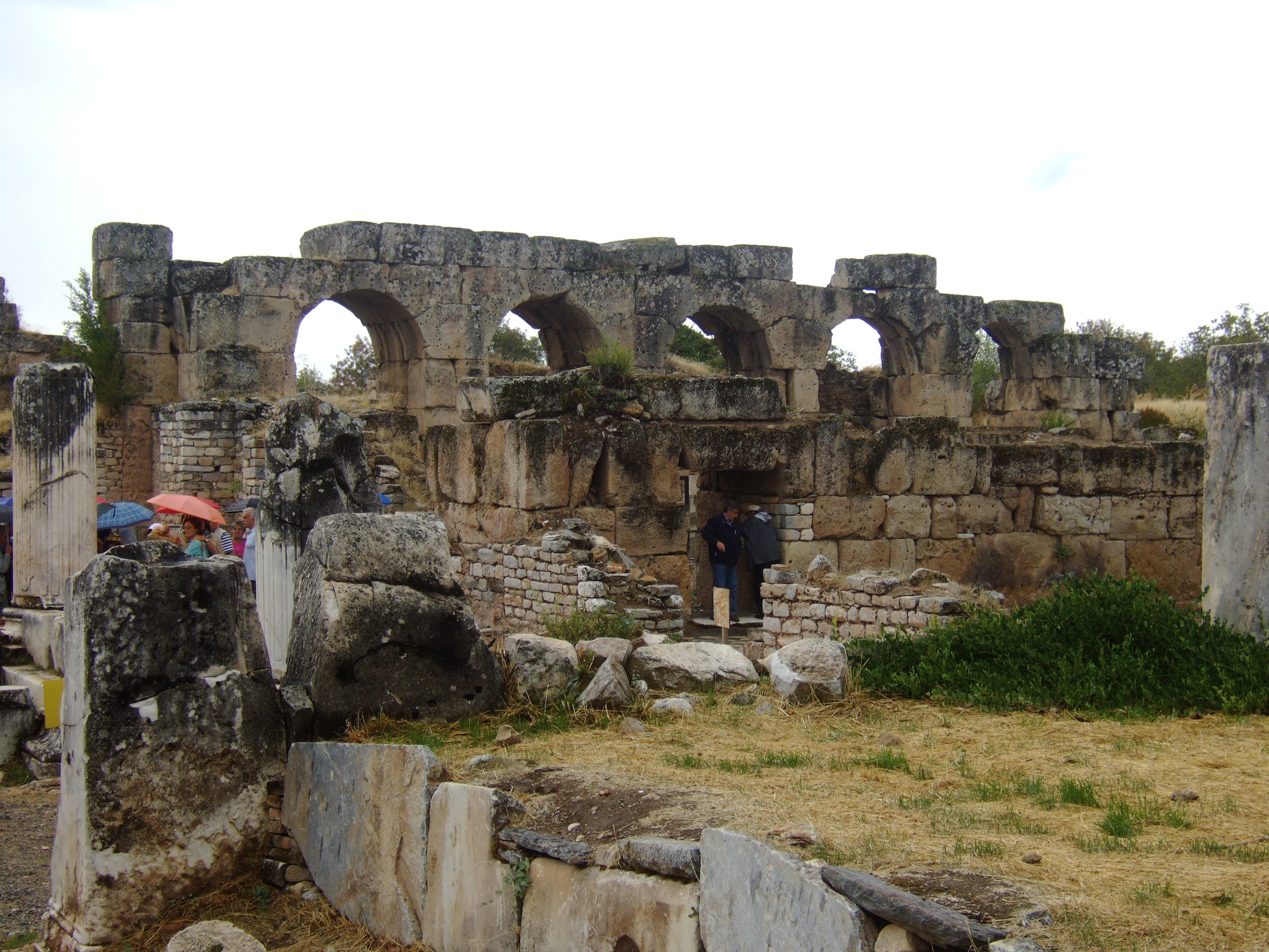 Aphrodisias: Bad